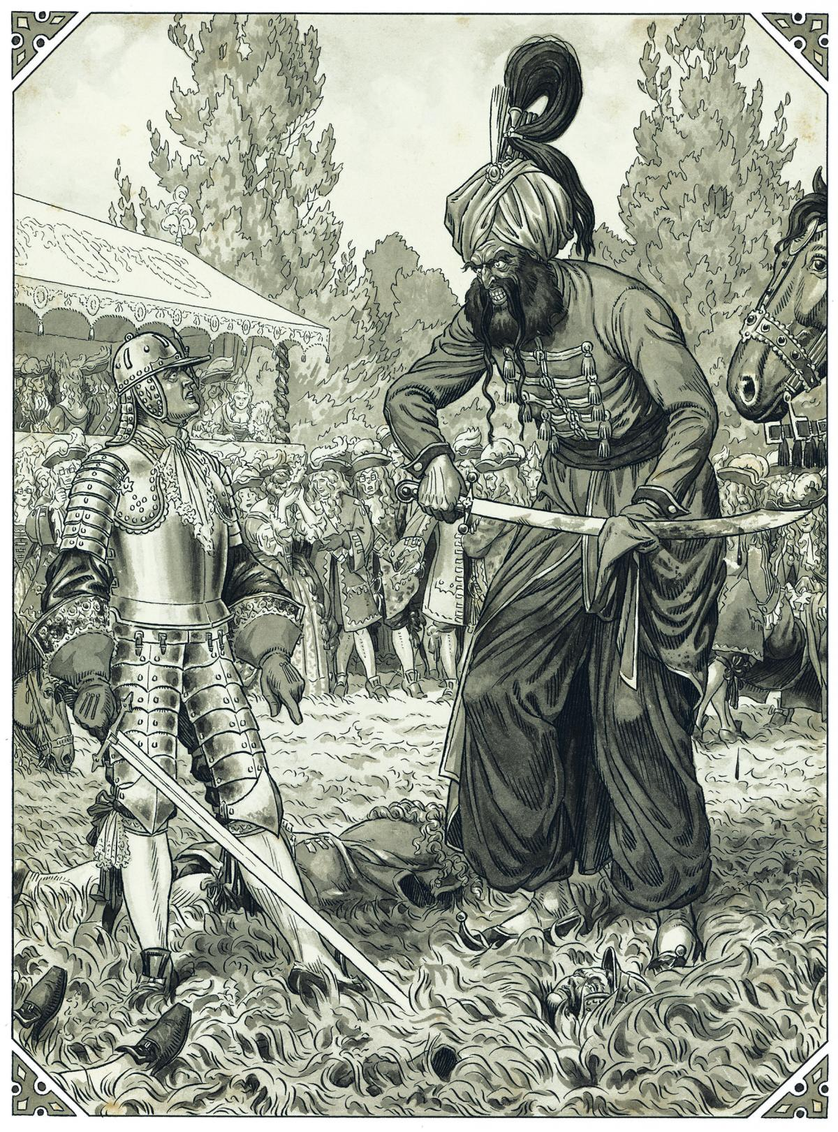 Ilustracija Brdavsa iz knjige Martin Krpan.